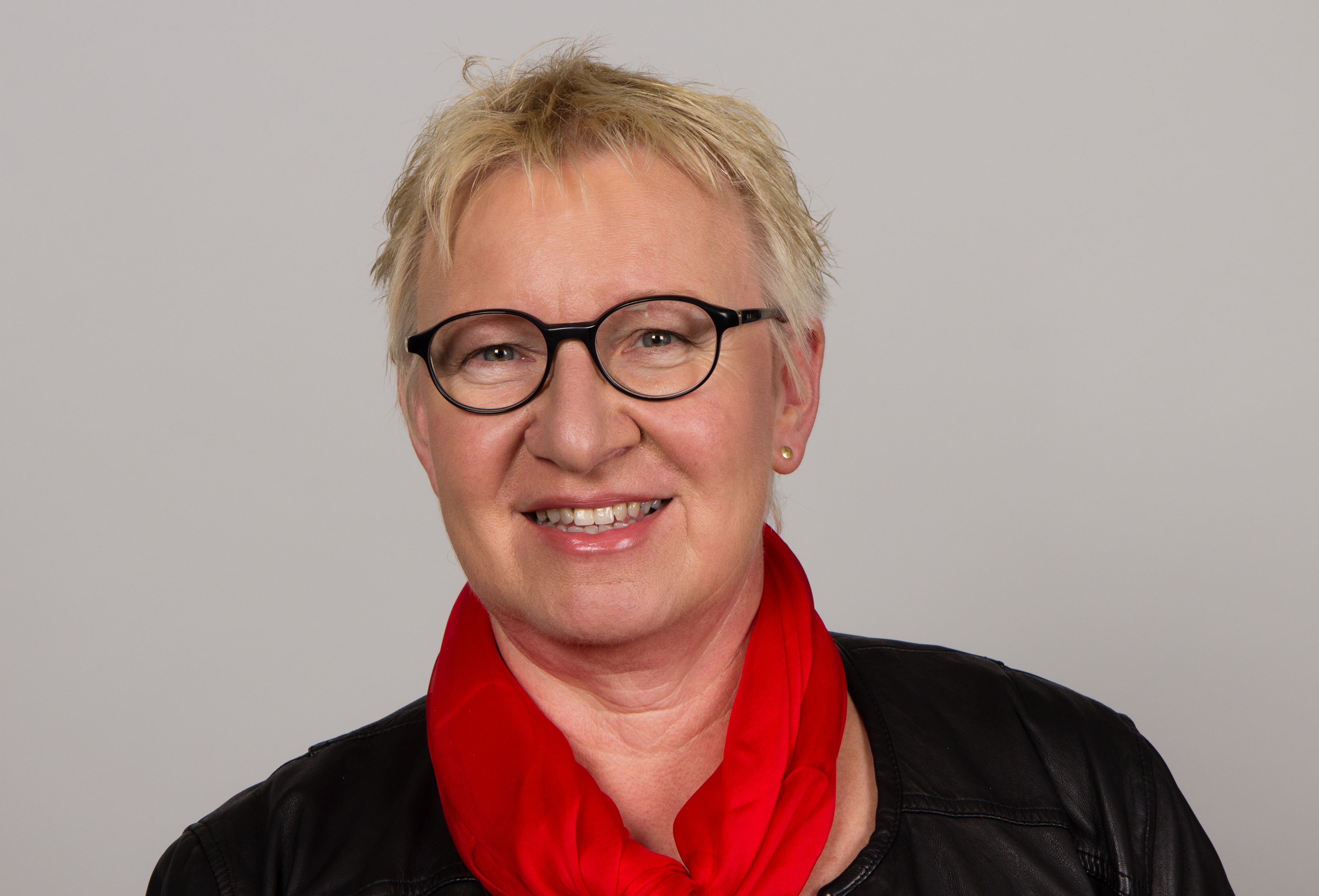 Jutta Krellmann (* 7. Januar 1956 in Johannisberg (Rheingau)) ist eine deutsche Politikerin (Die Linke) und Gewerkschafterin. Seit Oktober 2009 ist sie Mitglied des Deutschen Bundestages. Wikipedia-Bundestagsprojekt 2014 8–12 September 2014 in BerlinThis file was taken during the project “Wiki loves parliaments/Bundestag 2014” (German). Organisation: Martin Rulsch, Olaf KosinskyDesign: Martin KraftPhotography: Foto-AG Gymnasium Melle (Jan-Kristof Blömke, Lukas Eismann, Moritz Kosinsky, Laura Lessing, Karsten Mosebach, Mascha Mosebach, Teresa Schreer, Noah Sewöster, Niklas Tschöpe), Olaf Kosinsky, Martin Kraft, Harald Krichel, Steffen Prößdorf, Ralf Roletschek, Martin Rulsch, Gerd Seidel, Sven TeschkeVideo: Marc Rudnick, Manuel SchneiderEditors: Marcus Cyron, Günter Fremuth, Martin Kraft, Robin Krahl, Harald Krichel, Martin Rulsch, WikiAnikaReception: DasMonstaaa, Leonie Rabea Große, Lutheraner, Nina Möllering, Martin Rulsch, WikiAnika, Foto-AG Gymnasium MelleCosmetics: Regina Bosak, Bettina Dieguez, Sandra Kobbe, Andrea Strehlke; Irada Abdullayeva, Vivien Abelmann, Olena Engelbrecht, Sarah Fabini, Nina Magnus, Jacqueline Schmidt, Leonie Taboada, Julia Willer Usage information If you need more information how to use this file, please send an email to . Personality rights warningAlthough this work is freely licensed or in the public domain, the person(s) shown may have rights that legally restrict certain re-uses unless those depicted consent to such uses. In these cases, a model release or other evidence of consent could protect you from infringement claims.